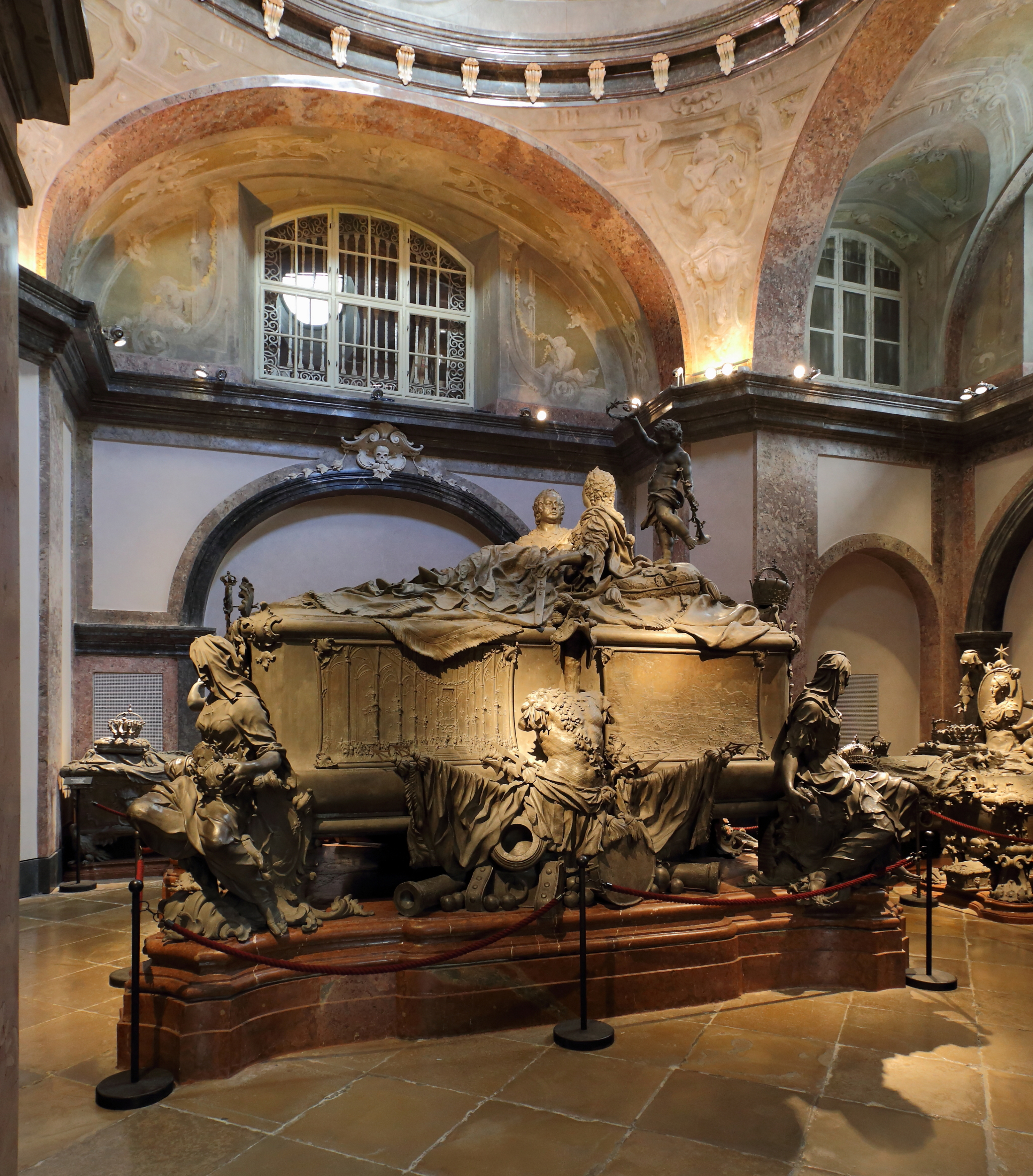 Der Doppelsarkophag des Kaiserpaars Maria Theresia (1717-1780) und Franz I. (1708-1765) in der Kapuzinergruft in Wien, Österreichs größte Gruft. Der Doppdelsarkophag wurde bereits 16 Jahre vor dem Tod der Kaiserin von Balthasar Ferdinand Moll (1717-1785) nach ihren Wünschen gefertigt.